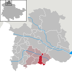 Gemeinde Wolkramshausen in Thüringen, Landkreis Nordhausen